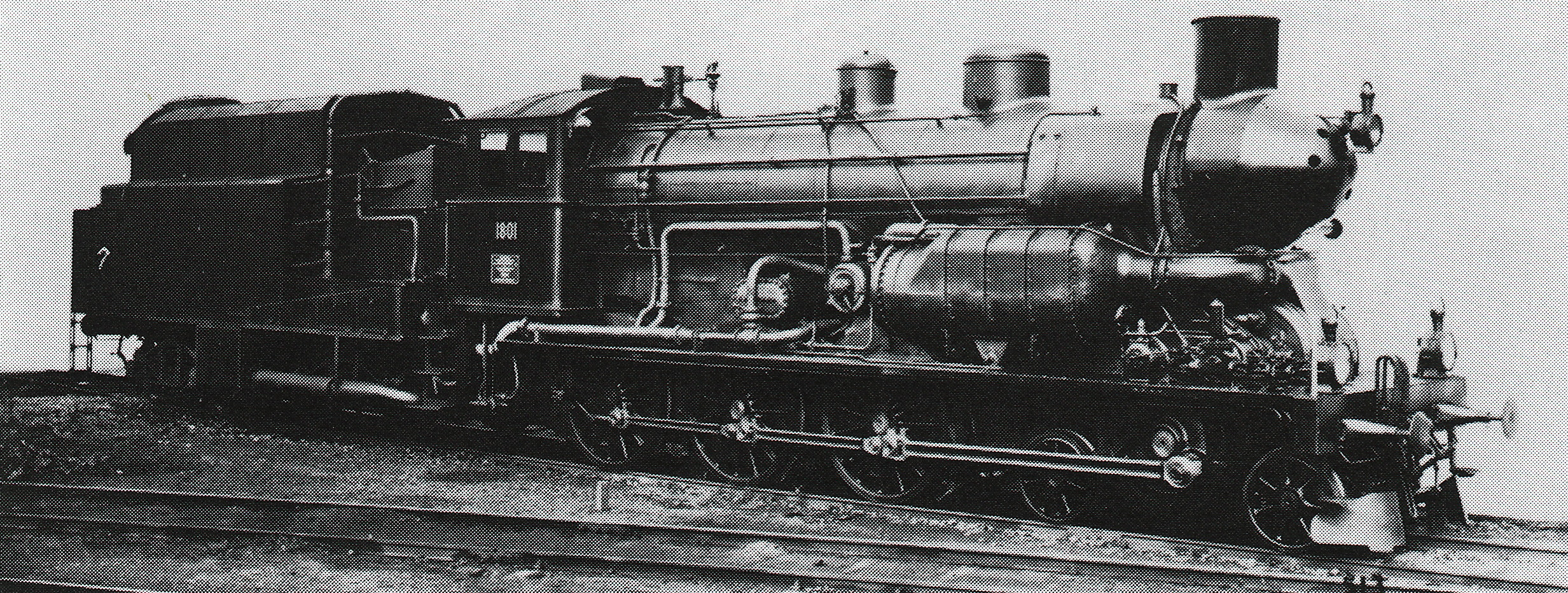 Verſuchslocomotive B 3/5 Nr. 1801 der Schweizeriſchen Bundesbahnen mit Zölly’ſcher Dampfturbine, 1919 umgebaut aus B 3/4 Nr. 1578, bis 1902 A3T Nr. 222 der Jura-Simplon-Bahn, gebaut 1891 inn der Schweizeriſchen Locomotiv- und Machines-Fabrique zů Winterthur (Fabricationsnr. 704), 1898 mit neuem Keſſel ausgeſtattet; 1924 an die Machines-Fabrique Eſcher, Wyß & Cie. verkauft, 1943 abgebrochen.